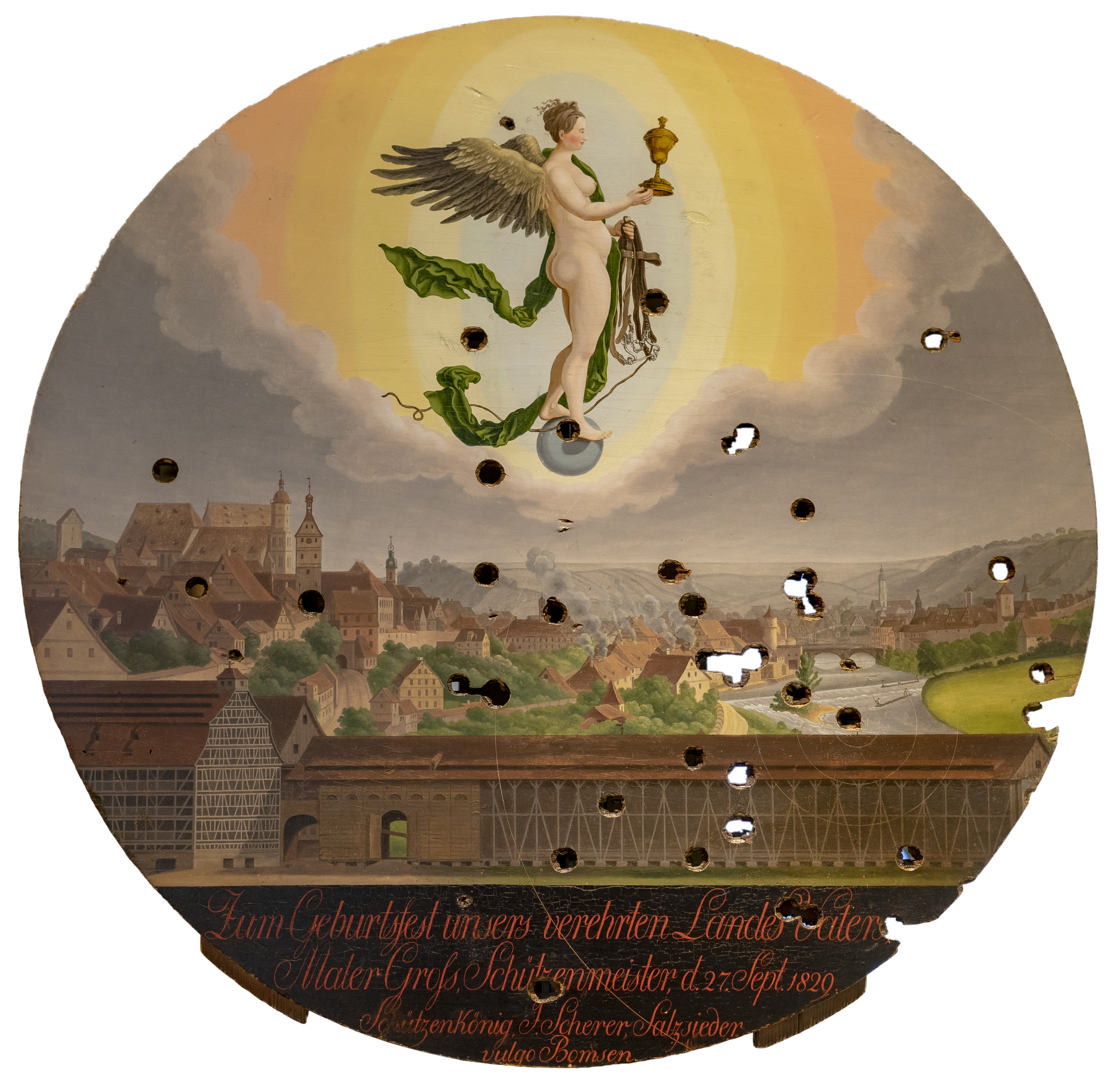 Hällisch-Fränkisches Museum in Schwäbisch Hall: historische Schützenscheibe von 1829, gemalt von Georg Peter Groß, mit Ansicht der Stadt Schwäbisch Hall von Norden und Darstellung der Göttin Fortuna (oben) mit typischen Attributen. Beschriftung: „Zum Geburtsfest unser(e)s verehrten LandesVaters. Maler Groß, Schützenmeister, d(en) 27. September 1829. Schützenkönig J. Scherer, Salzsieder, vulgo Bomsen.“ Grob freigestellte Version auf weißem Hintergrund (Originalfoto). Hinweis: Bei dem Museumsbesuch, bei dem diese Aufnahme gemacht wurde, konnte ich nirgendwo einen Hinweis auf ein generelles Fotografierverbot entdecken. Daher gehe ich davon aus, dass einer Veröffentlichung dieser Aufnahme auf Commons nichts entgegensteht. Selbstverständlich habe ich die Aufnahme ohne Blitz und ohne Stativ gemacht, um andere Besucher nicht zu stören. Dies führt natürlich zu einer begrenzten Bildqualität, die ich zu entschuldigen bitte.